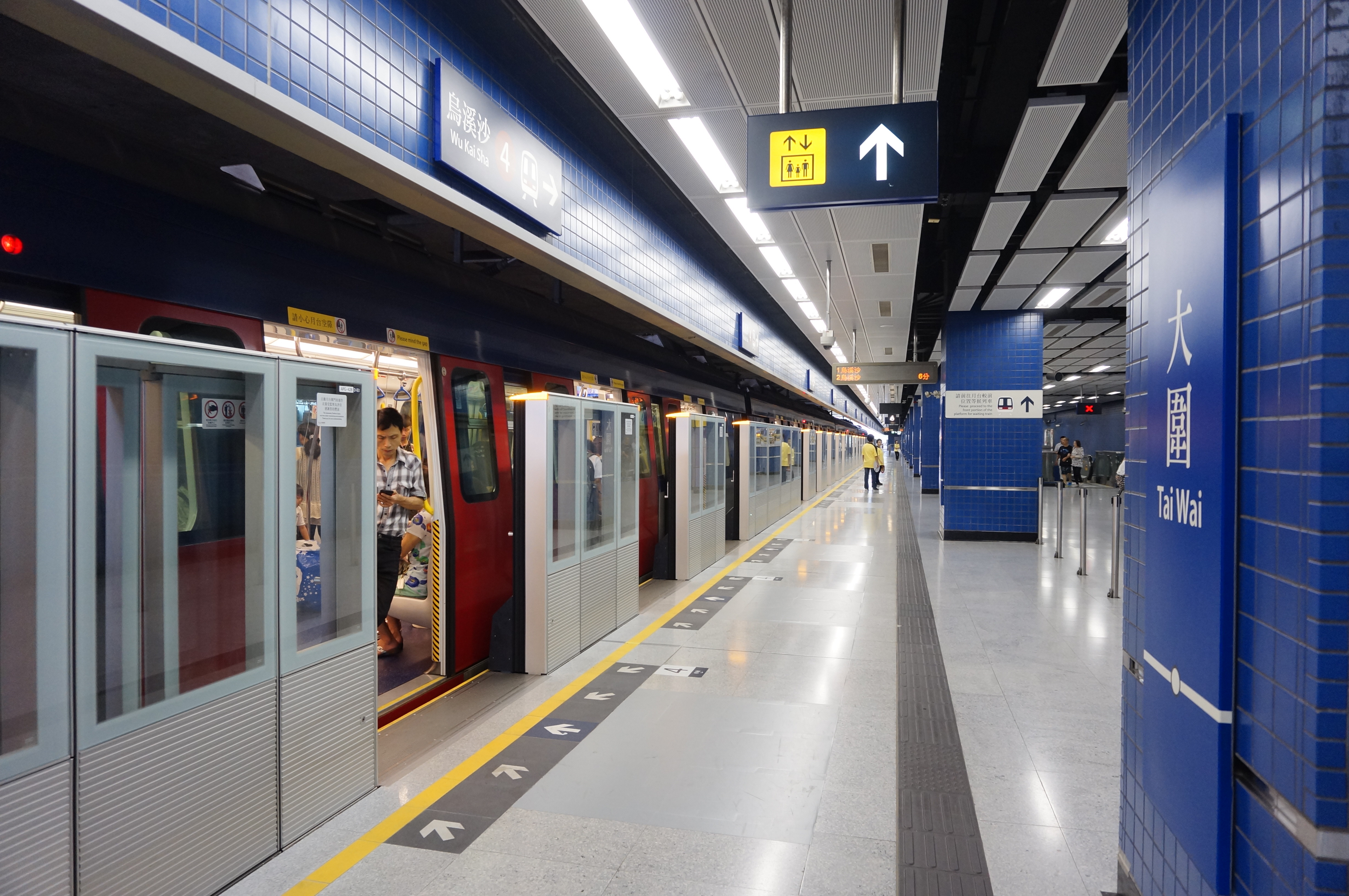 港鐵大圍站馬鞍山線月台